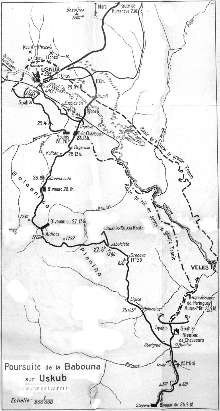 extrait du livre de François Léon Jouinot-Gambetta.